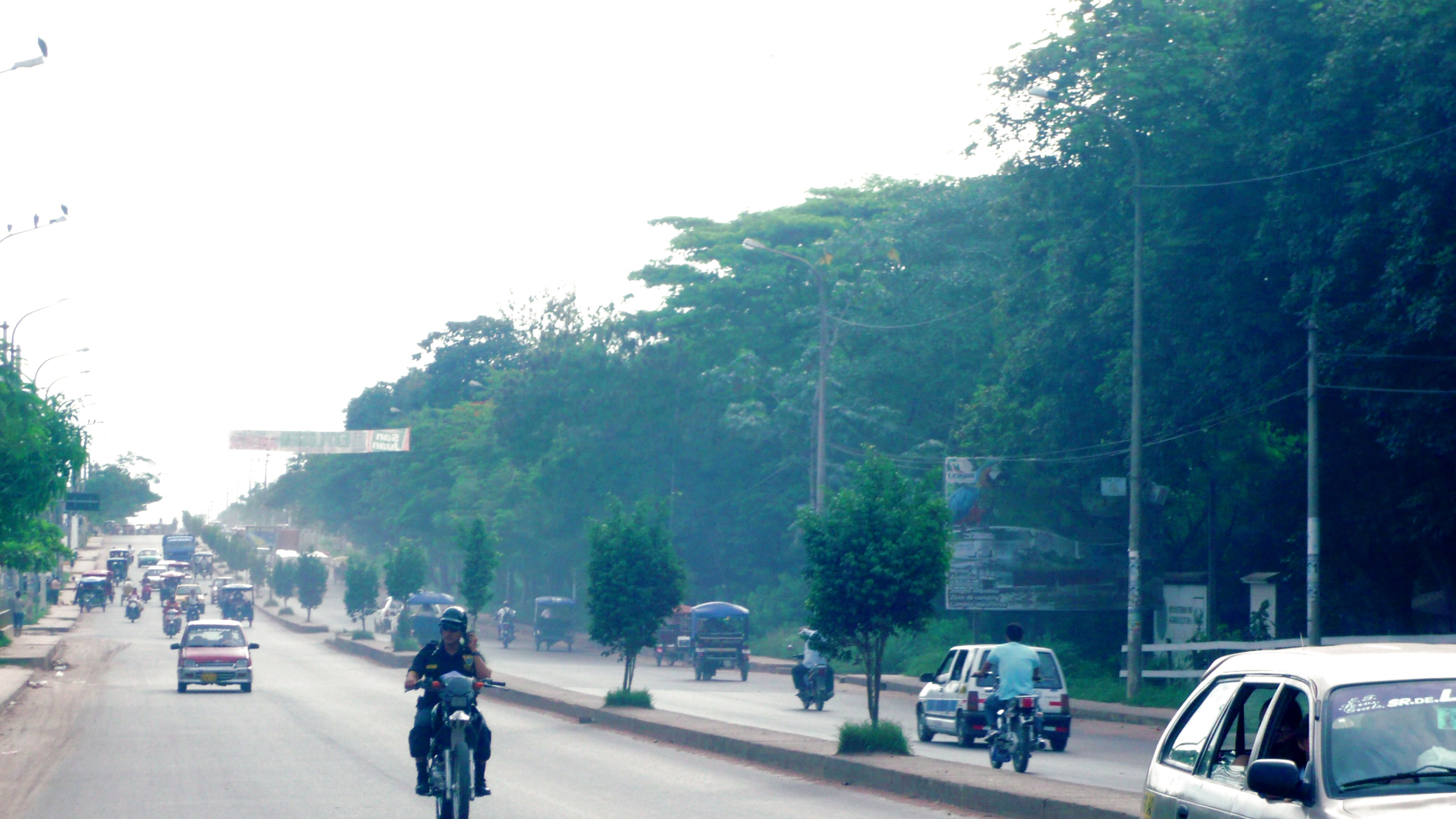 Vista del kilómetro 4,2 de la carretera Federico Basadre: Al frente la avenida centenario con una cantidad de tránsito. A la derecha el Parque Natural de Pucallpa.